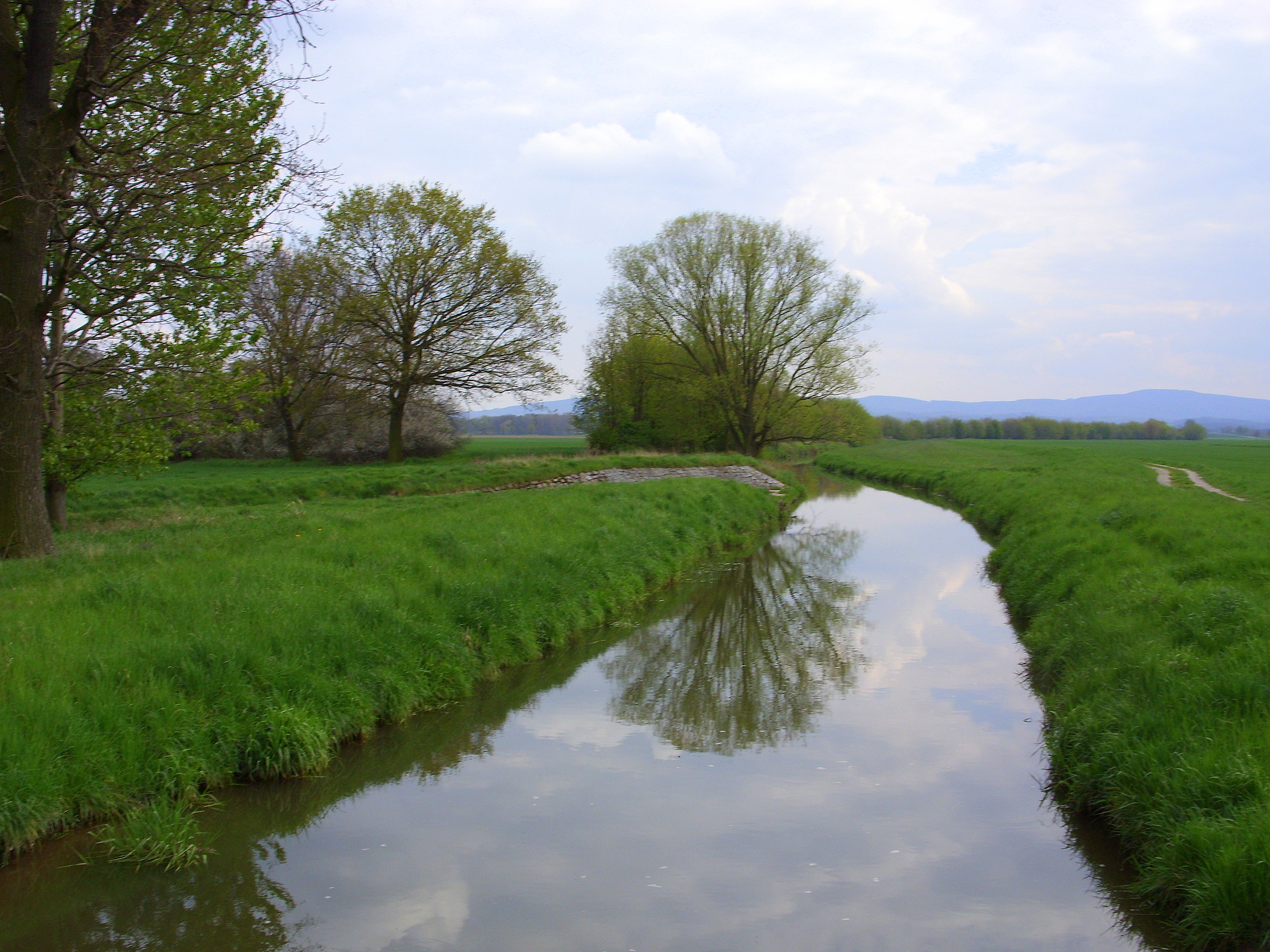 Das Kotitzer Wasser südlich von Buchwalde. Im Hintergrund rechts der Czorneboh. Hornjoserbsce: Kotołka južnje Bukojny z Čornobohom w pozadku.